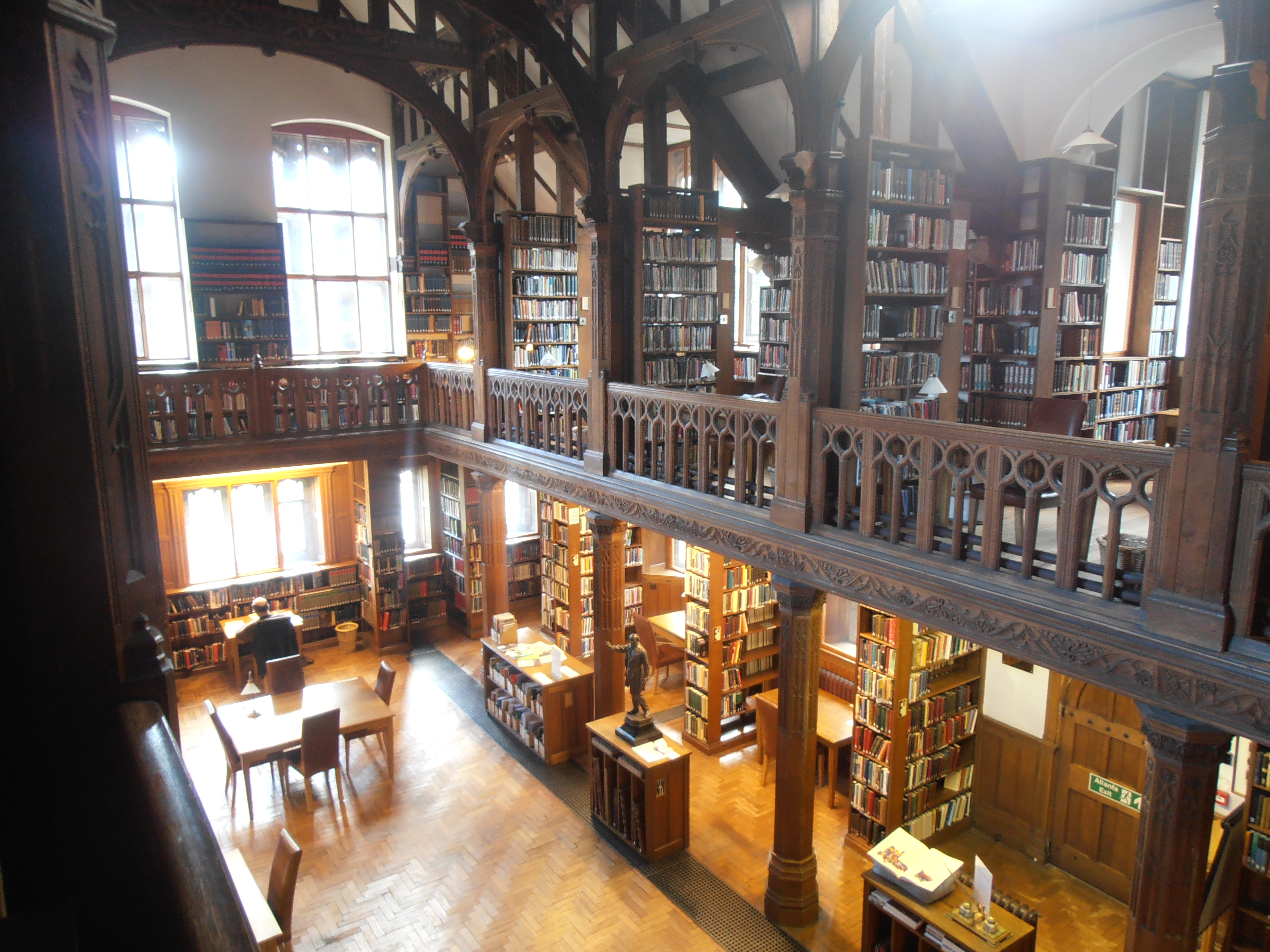 Llyfrgell Sant Deiniol / Llyfgell Gladstone, Penarlâg, Sir y Fflint.